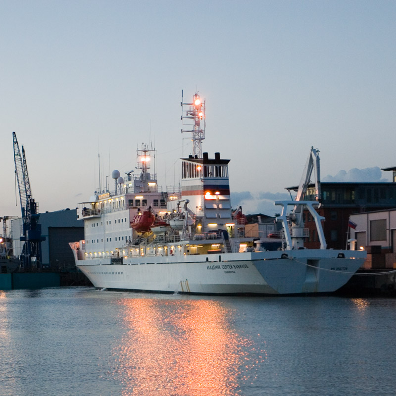 Akademik Vavilov in Bremerhaven IMO Number: 8507729 MMSI Number: 273414400 Callsign: UAUO Length: 117 m Beam: 18 m